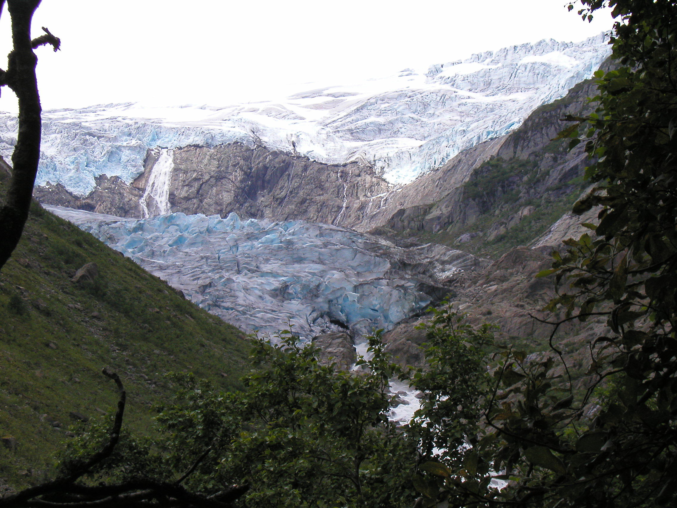 Buarbreen